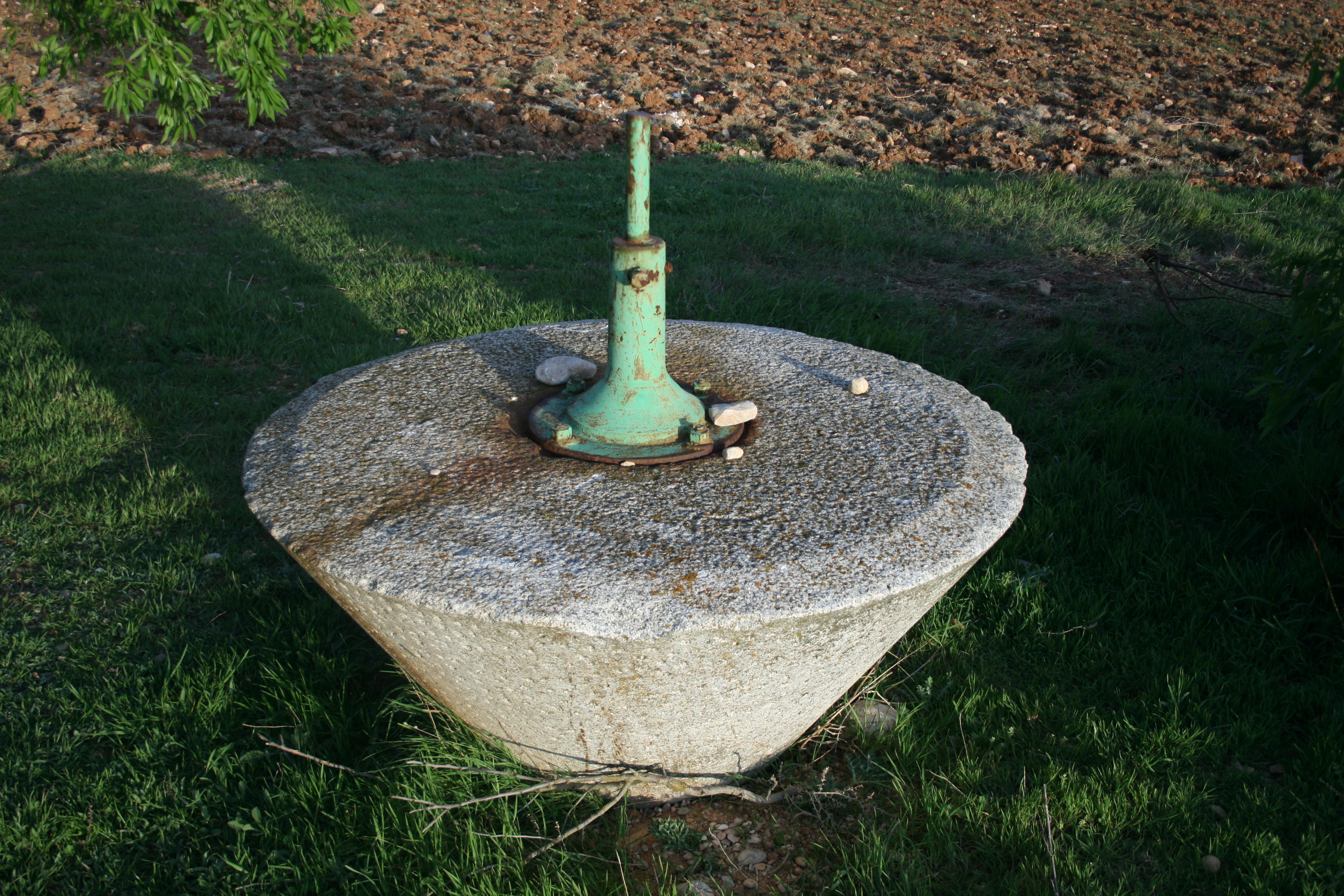 Muelas para el aceite de oliva (Pozoamargo) - Albacete